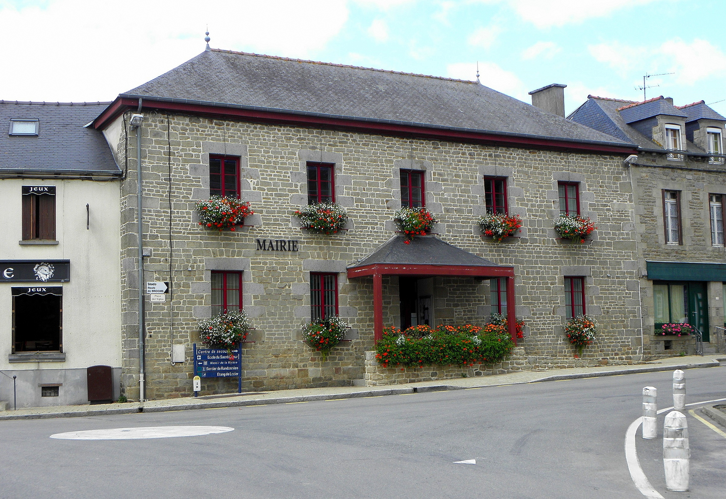 Mairie de Plumaugat (22).